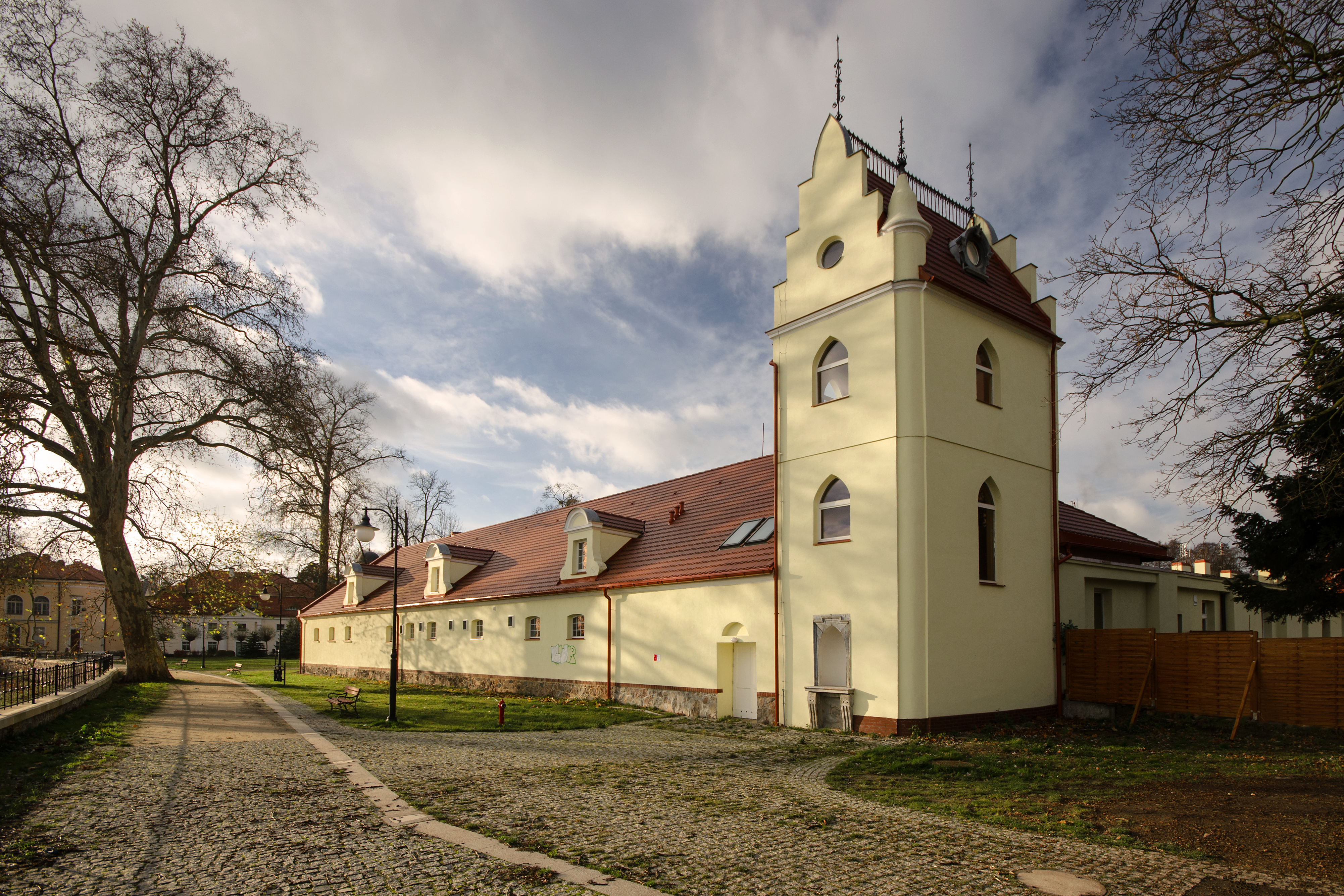 Brzeg Dolny, wozownia z wieżą